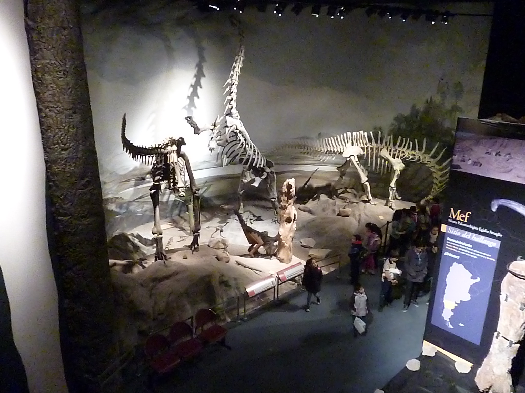 Museo Egidio Feruglio, Trelew